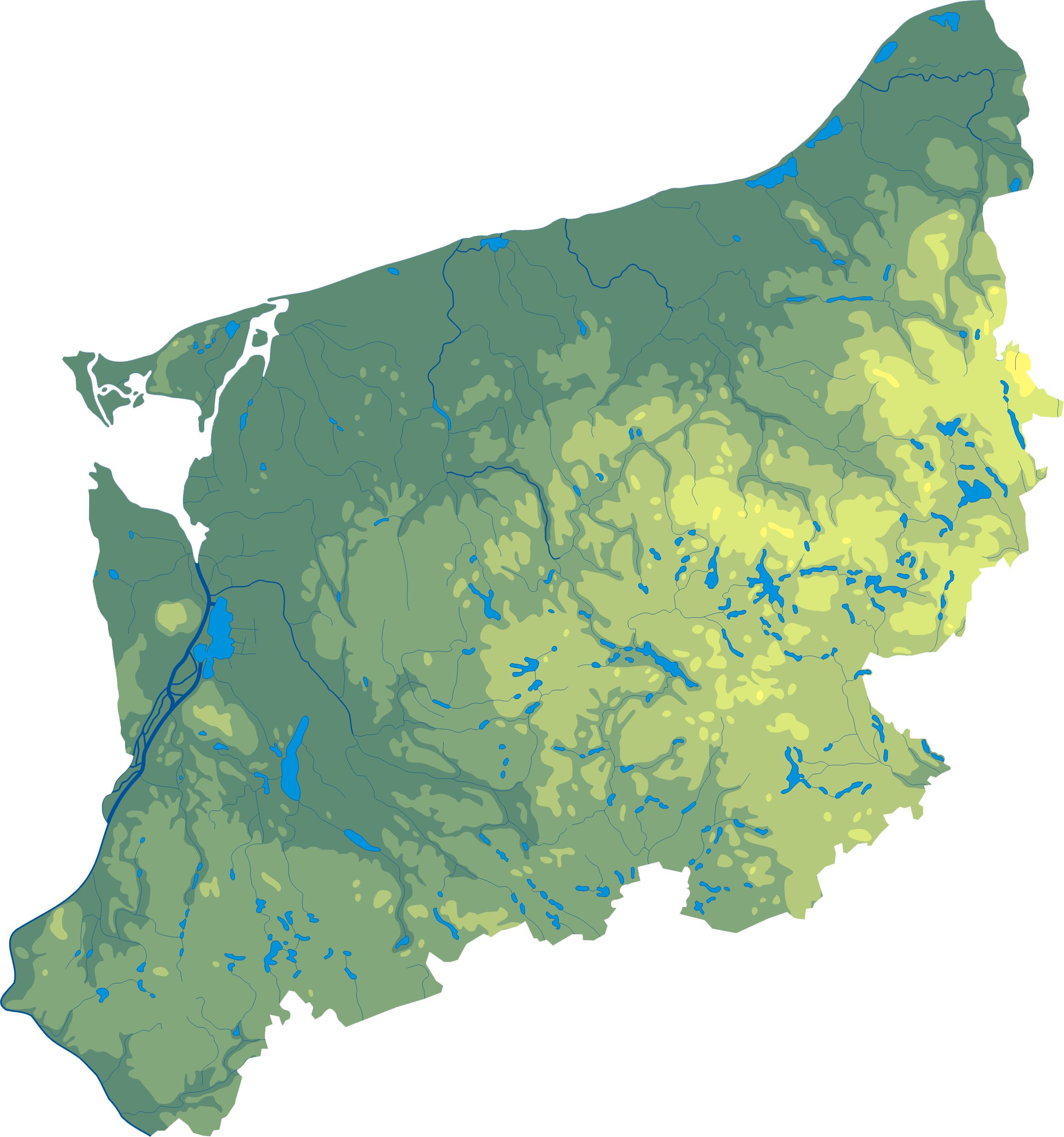 Mapa wód i ukształtowania powierzchni województwa zachodniopomorskiego. Autor: AotearoaWspółrzędne graniczne mapy: N: 54.5692° N S: 52.6310° N W: 14.1230° E E: 16.9821° E Legenda